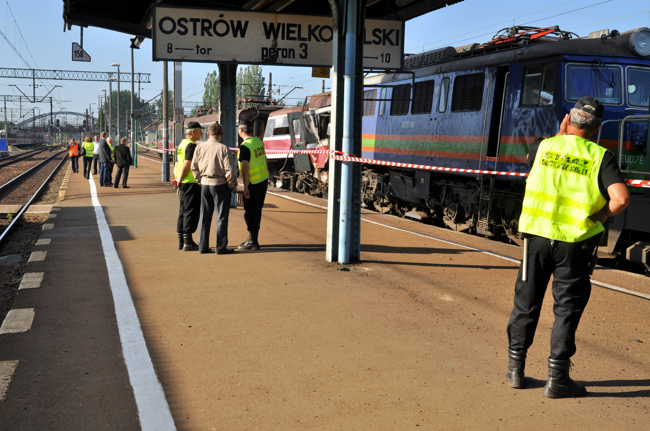 Zderzenie pociągów na stacji w Ostrowie Wlkp. Pociąg towarowy wjechał w tył podstawionego, pustego pociągu osobowego do Wrocławia. Kierownik i maszynista pociągu osobowego odnieśli obrażenia ( 27. 05. 2012 r.)